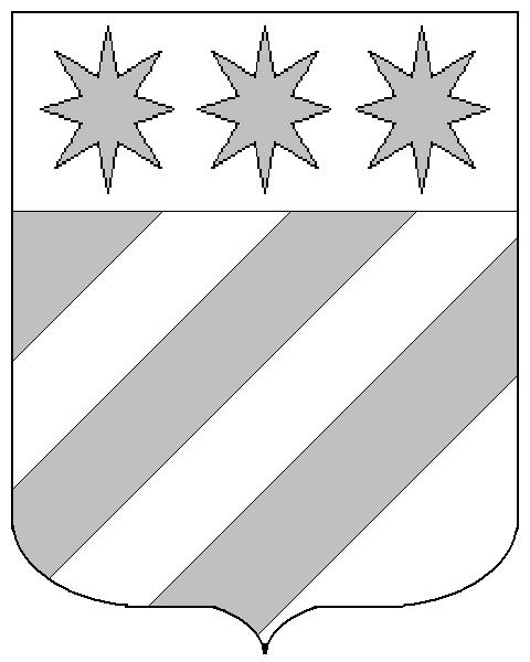 Grb obitelji Karepić